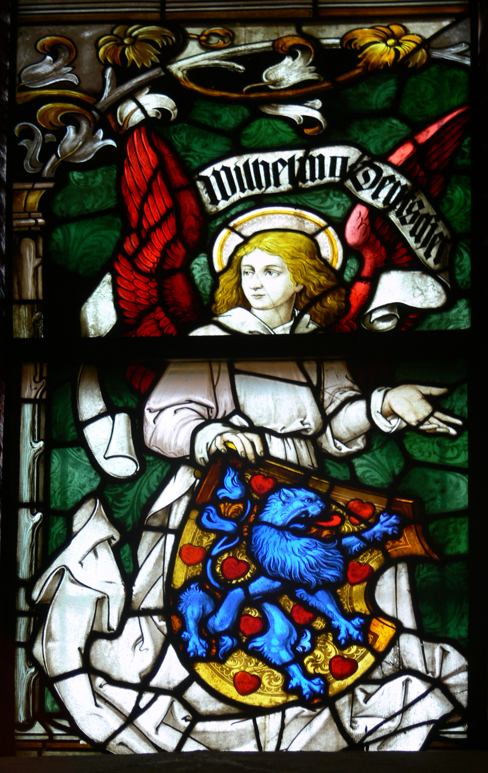 Lüneburg, Kirche St. Johannis Mittleres Chorfenster von Karl de Bouché (1906 von Kaiser Wilhelm II. gestiftet): Engel mit Wappen